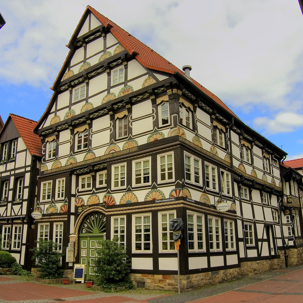 Bürgerhus in der Kupferschmiedestraße, erbaut 1560